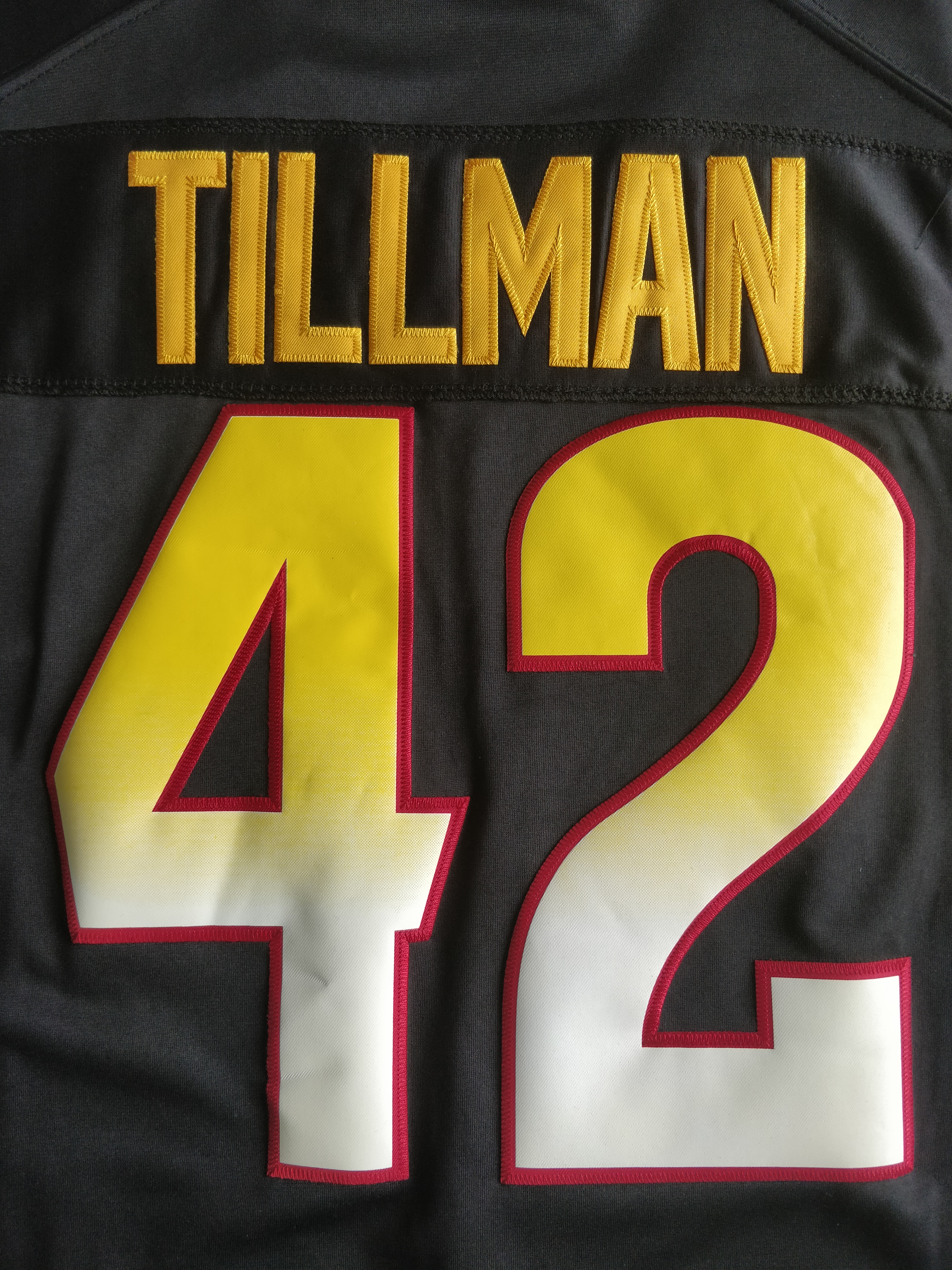 Pat Tillman's Sun Devils jersey